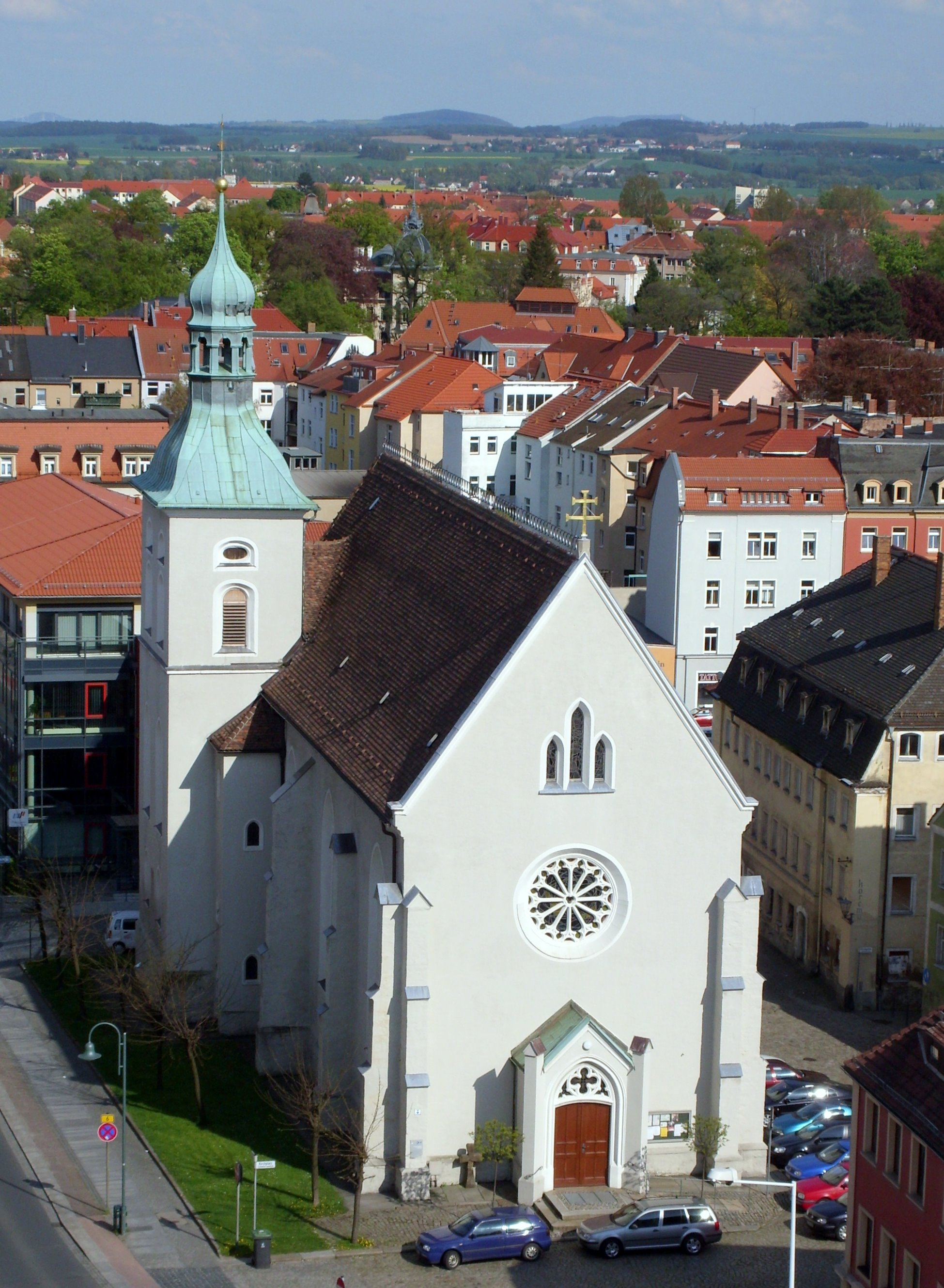 Die Liebfrauenkirche in Bautzen. Blick vom Reichenturm. Hornjoserbsce: Napohlad Serbskeje cyrkwje w Budyšinje wot Bohateje wěže.